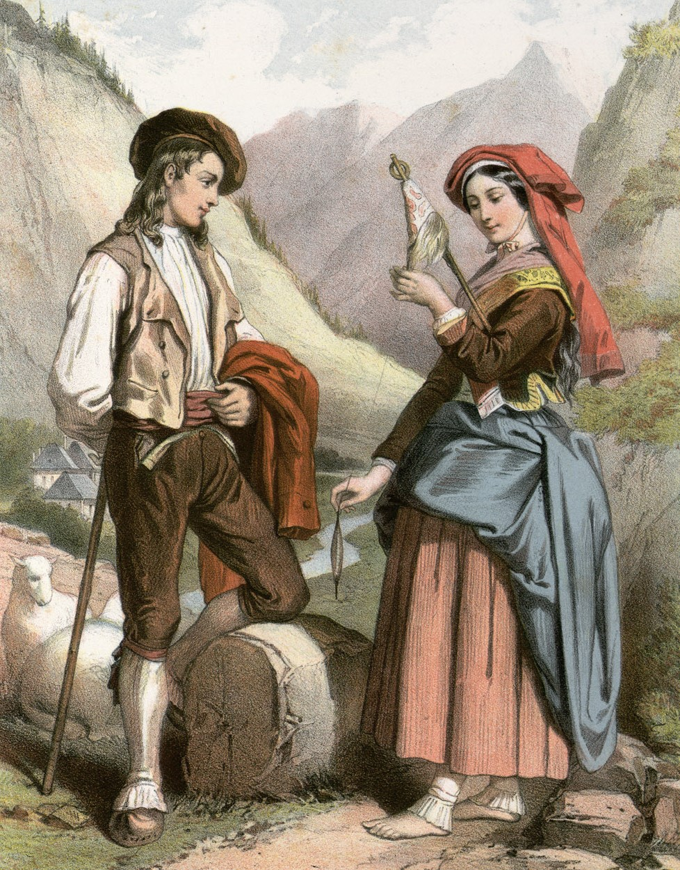 Pâtre et jeune fille des Eaux-Chaudes, vallée d'Ossau